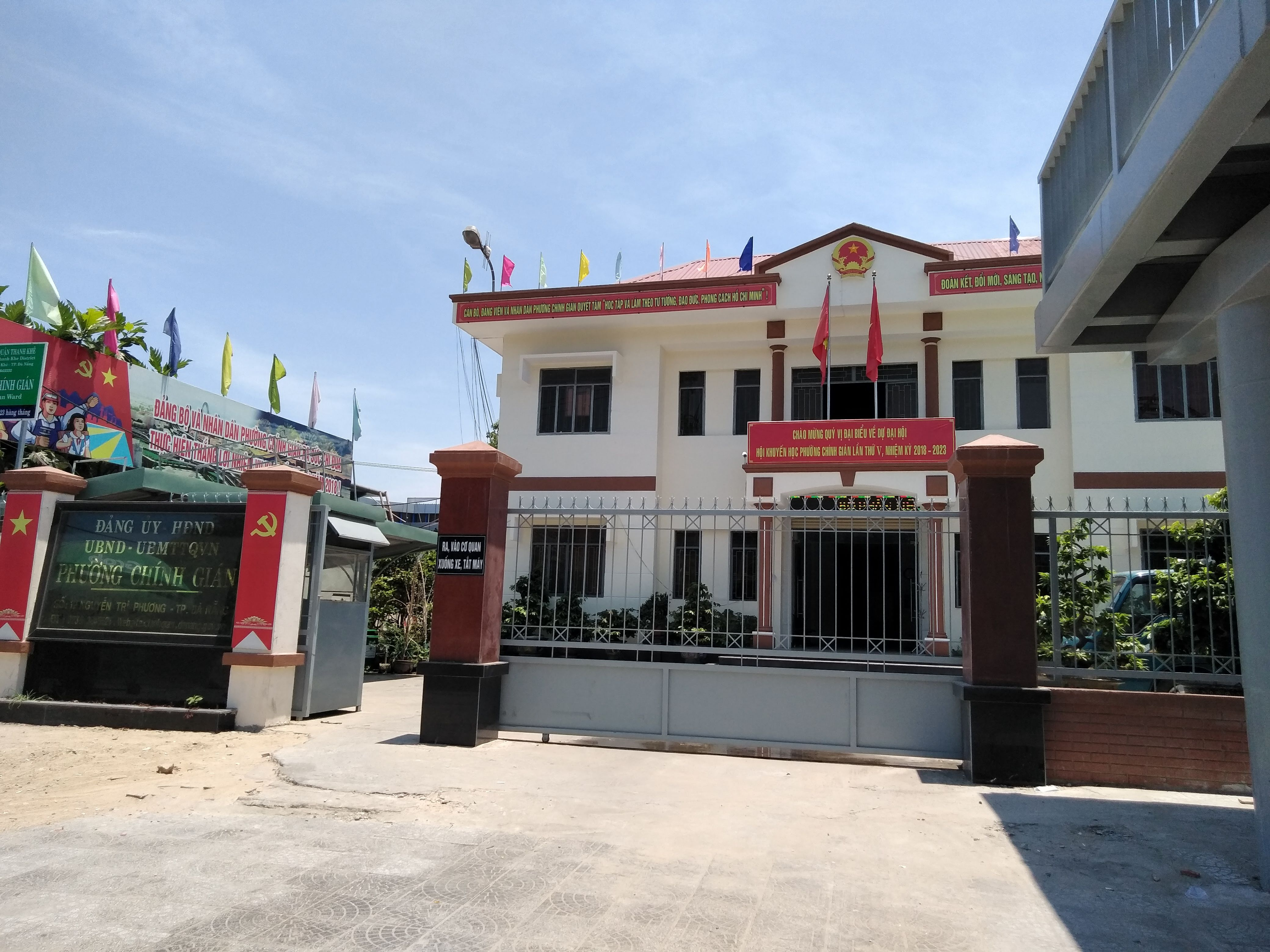 UBND phường Chính Gián, Thanh Khê, Đà Nẵng